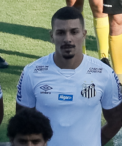 (Santos - SP, 16/11/2019) Partida de futebol Santos e São Paulo na Vila Belmiro. Foto: Isac Nóbrega/PR